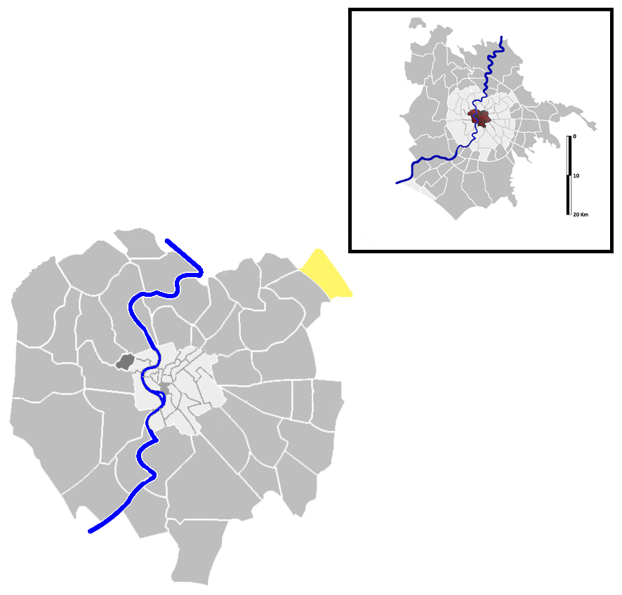 San Basilio